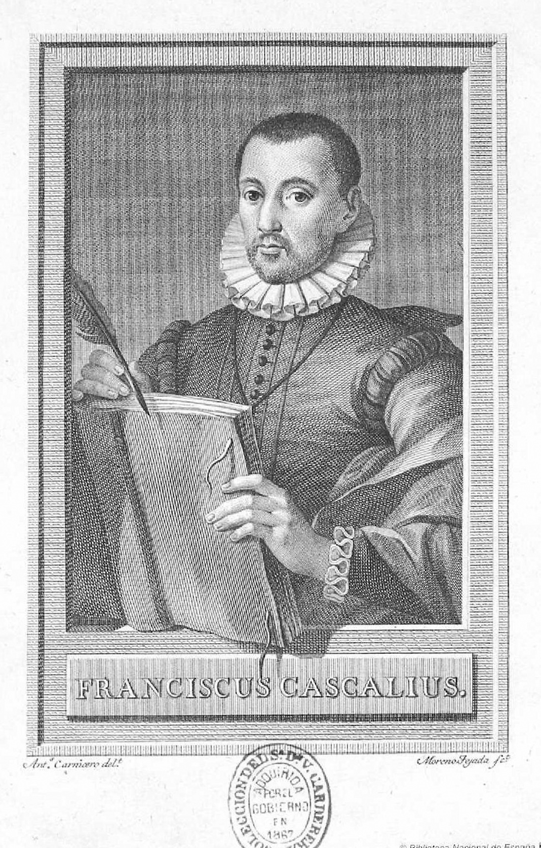 Retrato de Francisco Cascales, grabado calcográfico de Juan Moreno de Tejada por dibujo de Antonio Carnicero. Ilustración de las Tablas poéticas de Francisco Cascales. Biblioteca Nacional de España